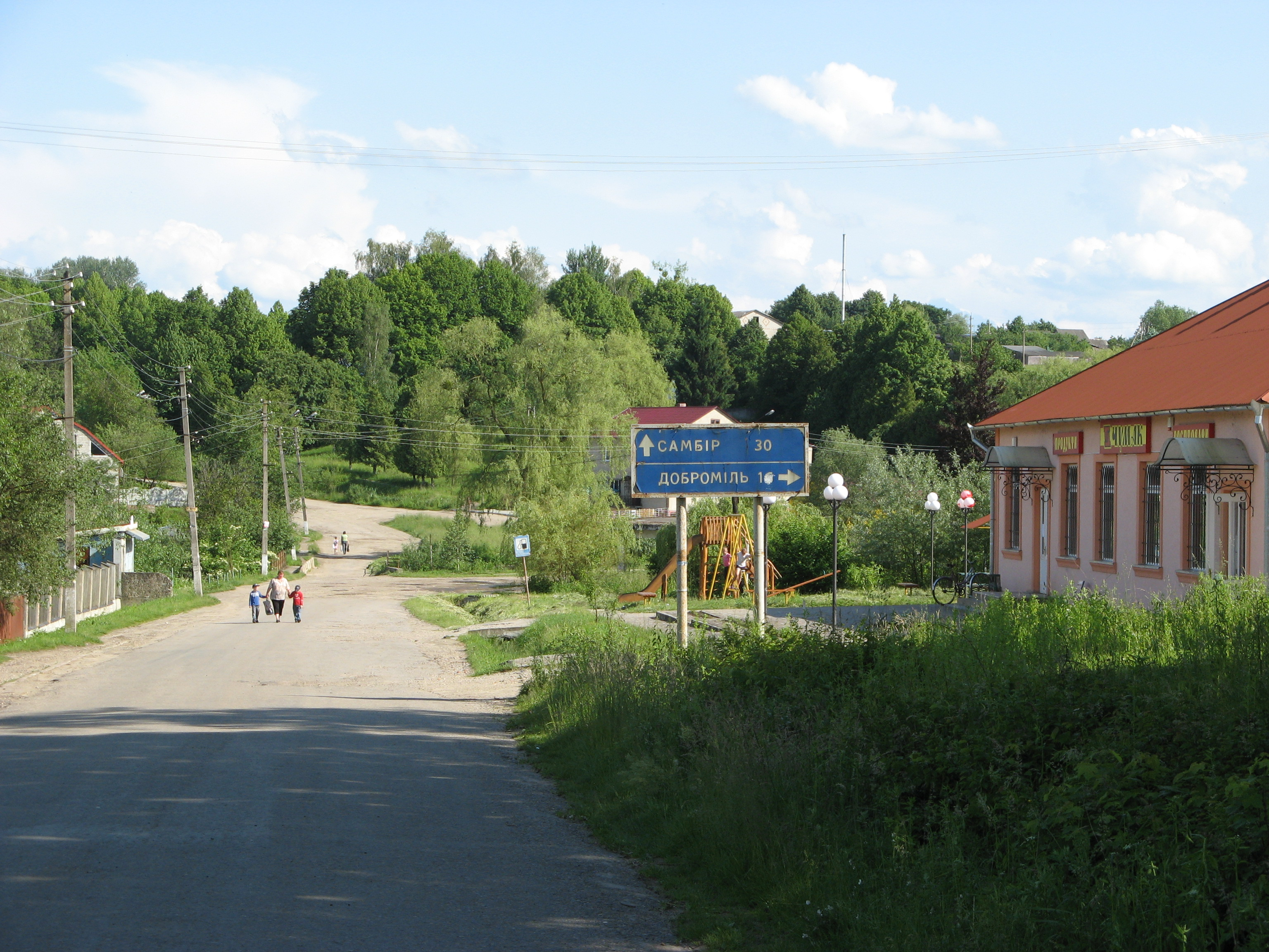 с. Міженець, Старосамбірський р-н, Львівська обл.